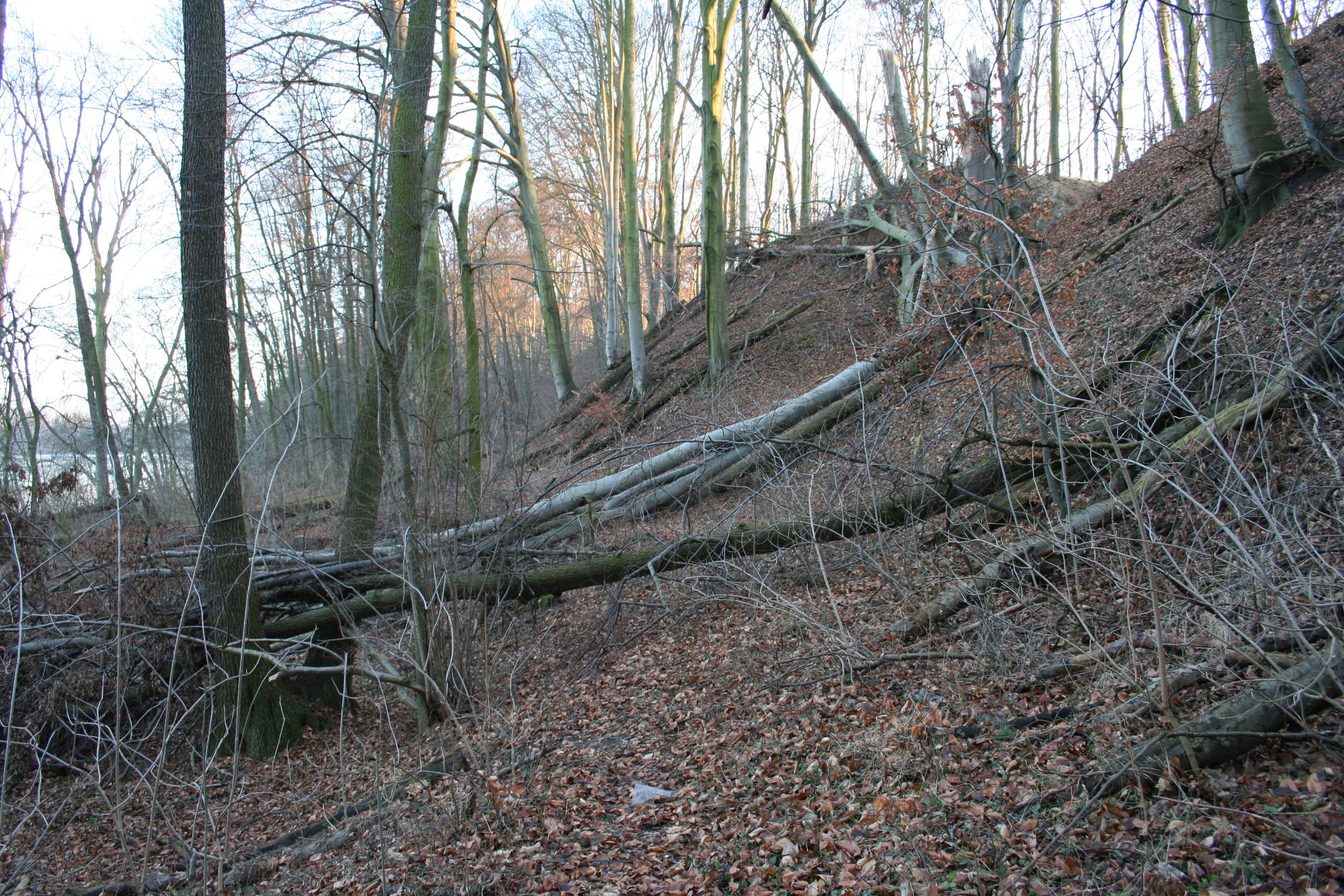 Rezerwat "Buki nad Jez. Lutomskim"